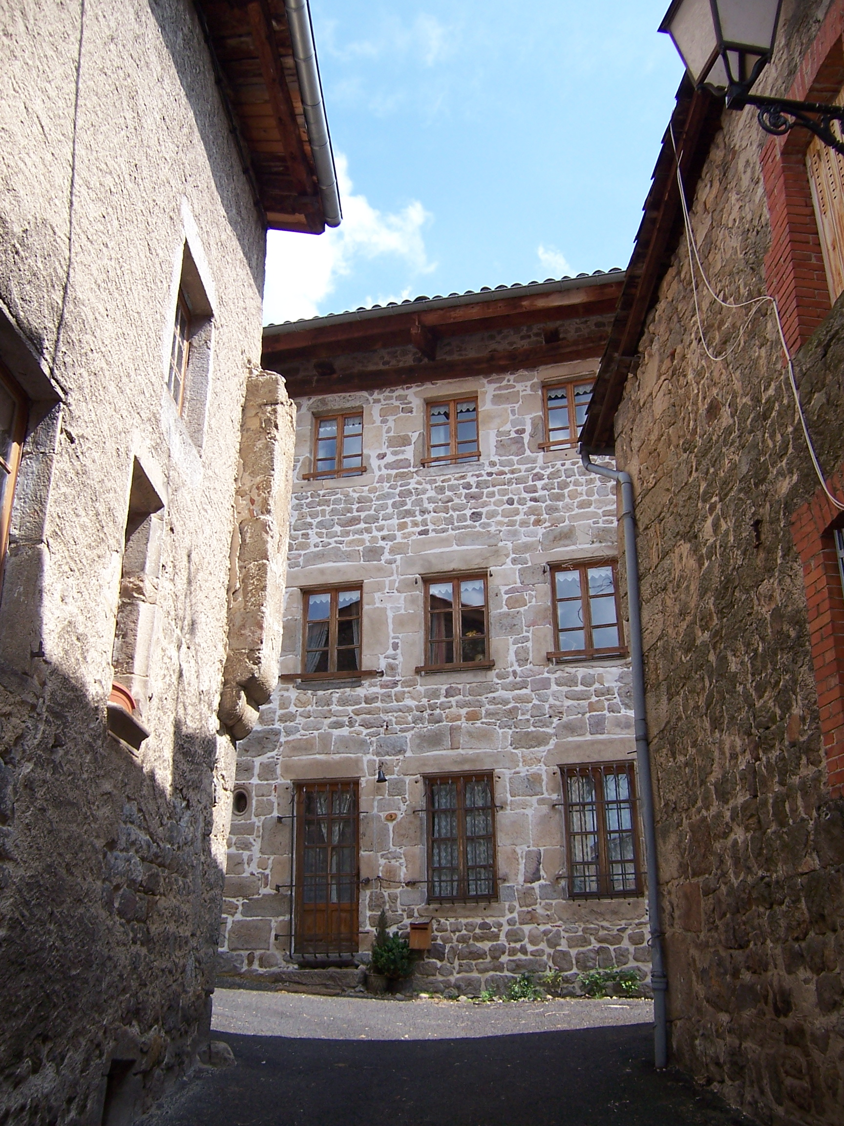 Viverols